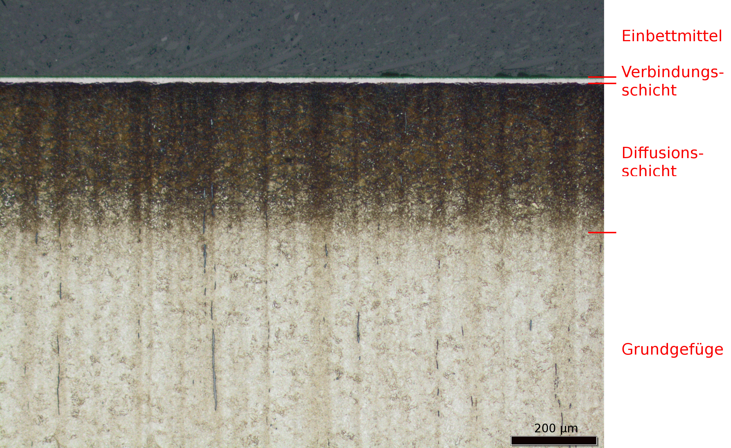 Dieses Bild zeigt den grundsätzlichen Aufbau einer Nitrierschicht. Als Werkstoff kam ein 31CrMoV9 zum Einsatz. Behandelt wurde er 12 Stunden bei 570°C.